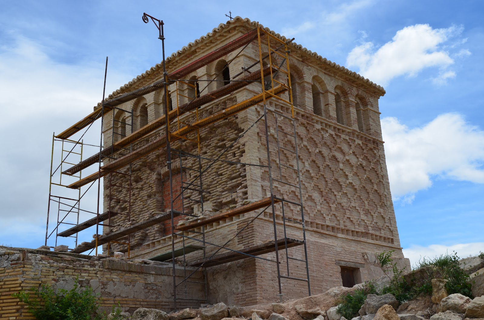 Restauracion Casa de la Estanca (Borja)